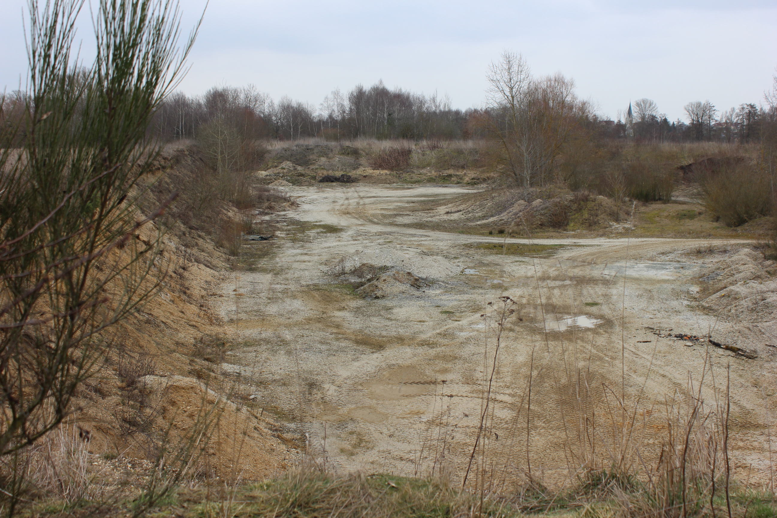 Die Kiesgruben nordwestlich von Perkam gehören zur Liste der Geotope im Landkreis Straubing-Bogen mit der Kennung 278A018. Die Kiesgruben liegen unweit der Mäanderschleife der kleinen Laaber.